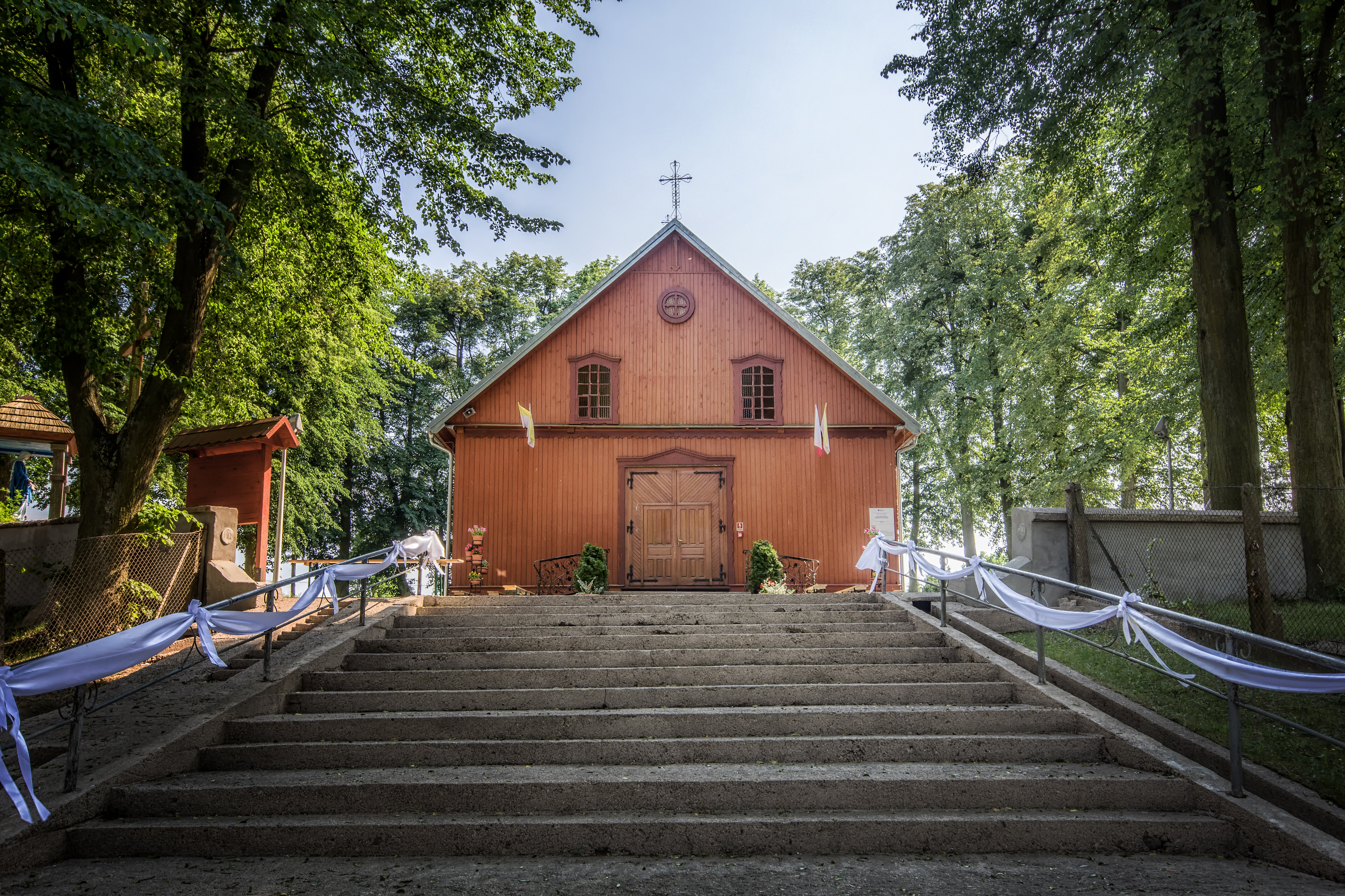 Dobry Las, Kościół Najśw. Serca Jezusa